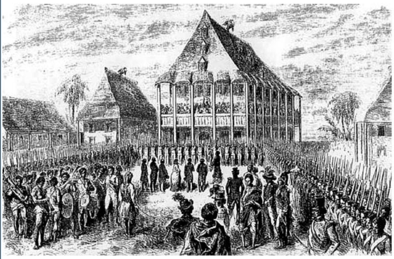 Ida Pfeiffer, Jean Laborde en andere Europeanen staan terecht voor Koningin Ranavalona I